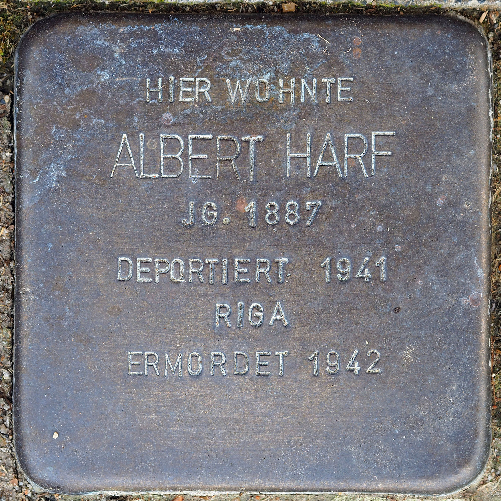 Stolpersteine MG: Harf, Albert